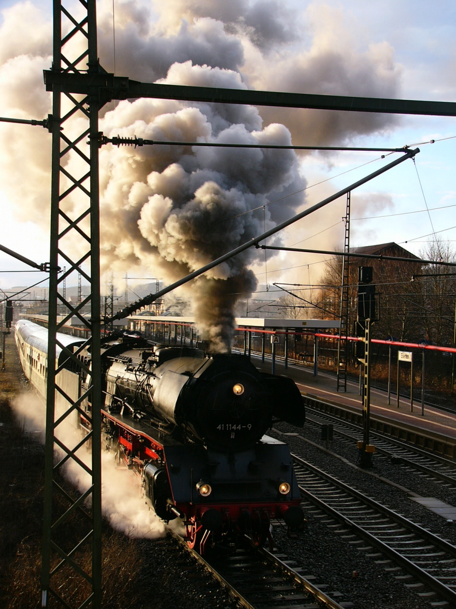 Die Dampflok 41 1144 verlässt mit dem Thüringenzug den abendlichen Eisenacher Bahnhof.